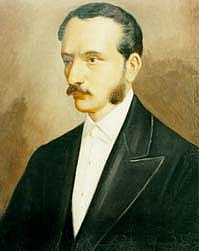 José de Antepara, Procer de la Independencia de Guayaquil